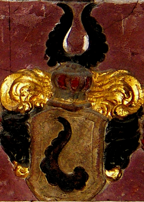 Wappen der Vorfahren von Christoffel Eitel von Schutzbar und Frau auf ihrem Epitaph in der ev. Kirche in Treis an der Lumbda (Hessen, Deutschland). Männliche Linie: 01m - 16m; weibliche Linie: 01w - 16w.